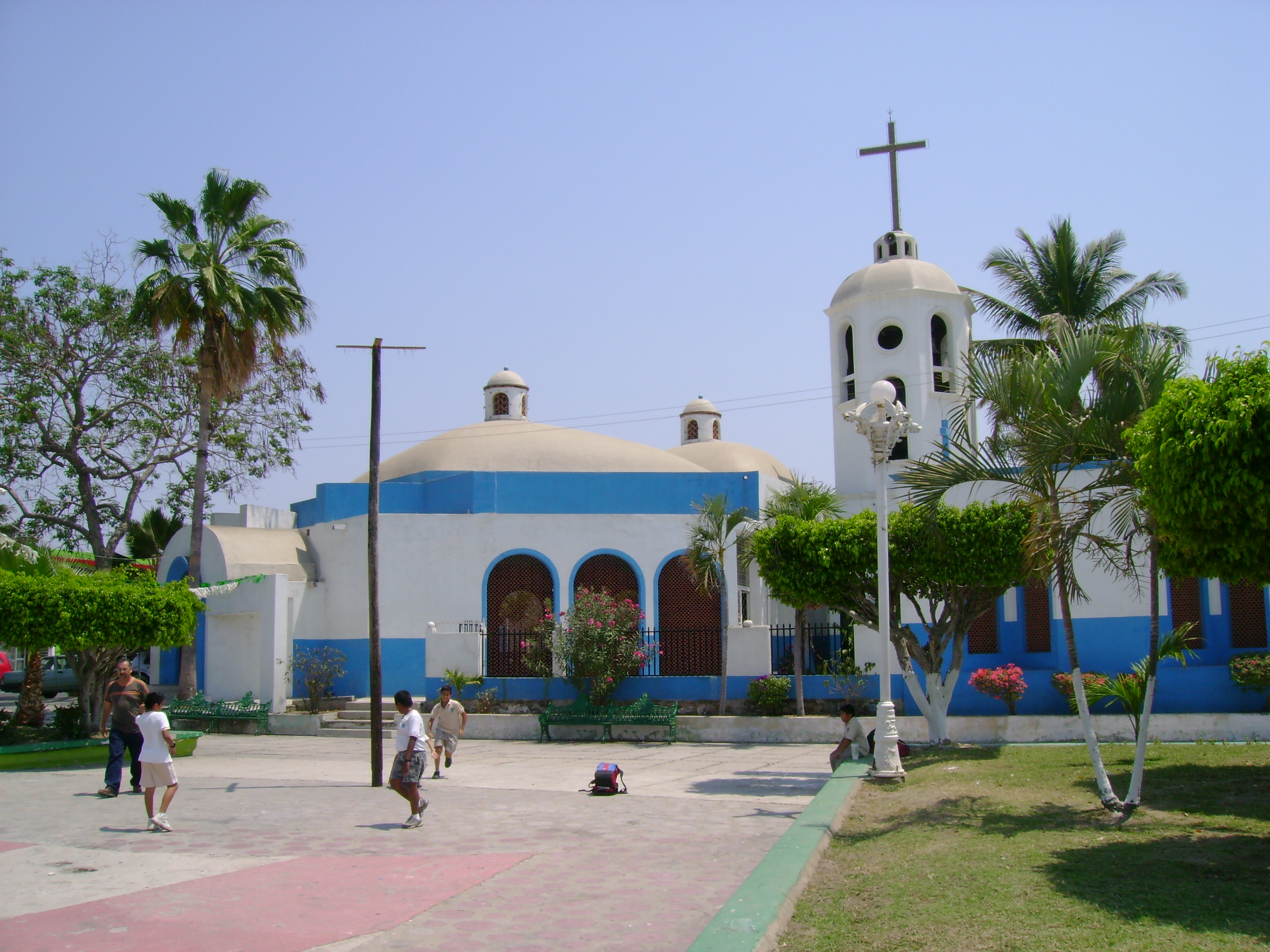 Centro de Salagua, en la ciudad de Manzanillo, Colima, Mexico